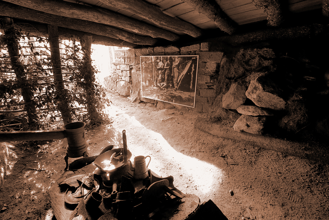 Hideaway in the woods